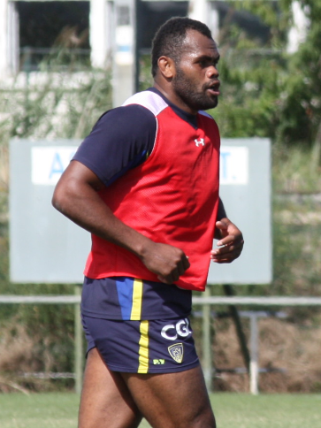 Asm Clermont